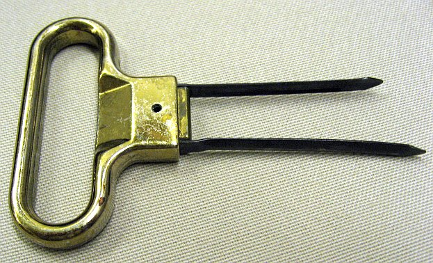 Laschen-Korkenzieher